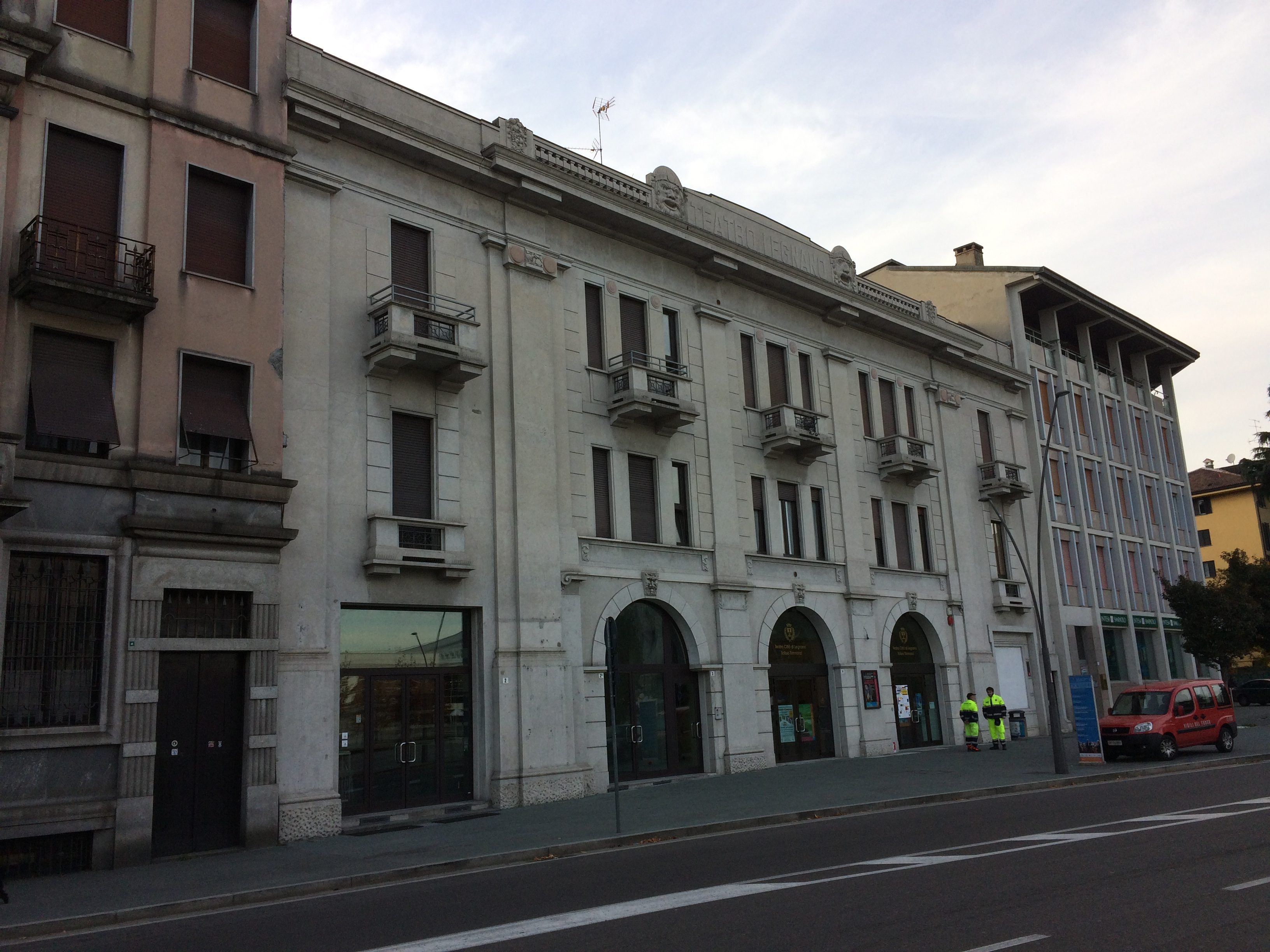 Al centro dell'immagine, il Teatro Città di Legnano